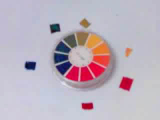 pH-indicator-papier - zelf gemaakt